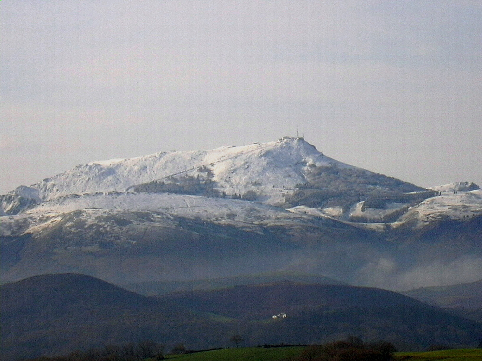 La Rhune, prise le 01/02/04 par Harrieta171